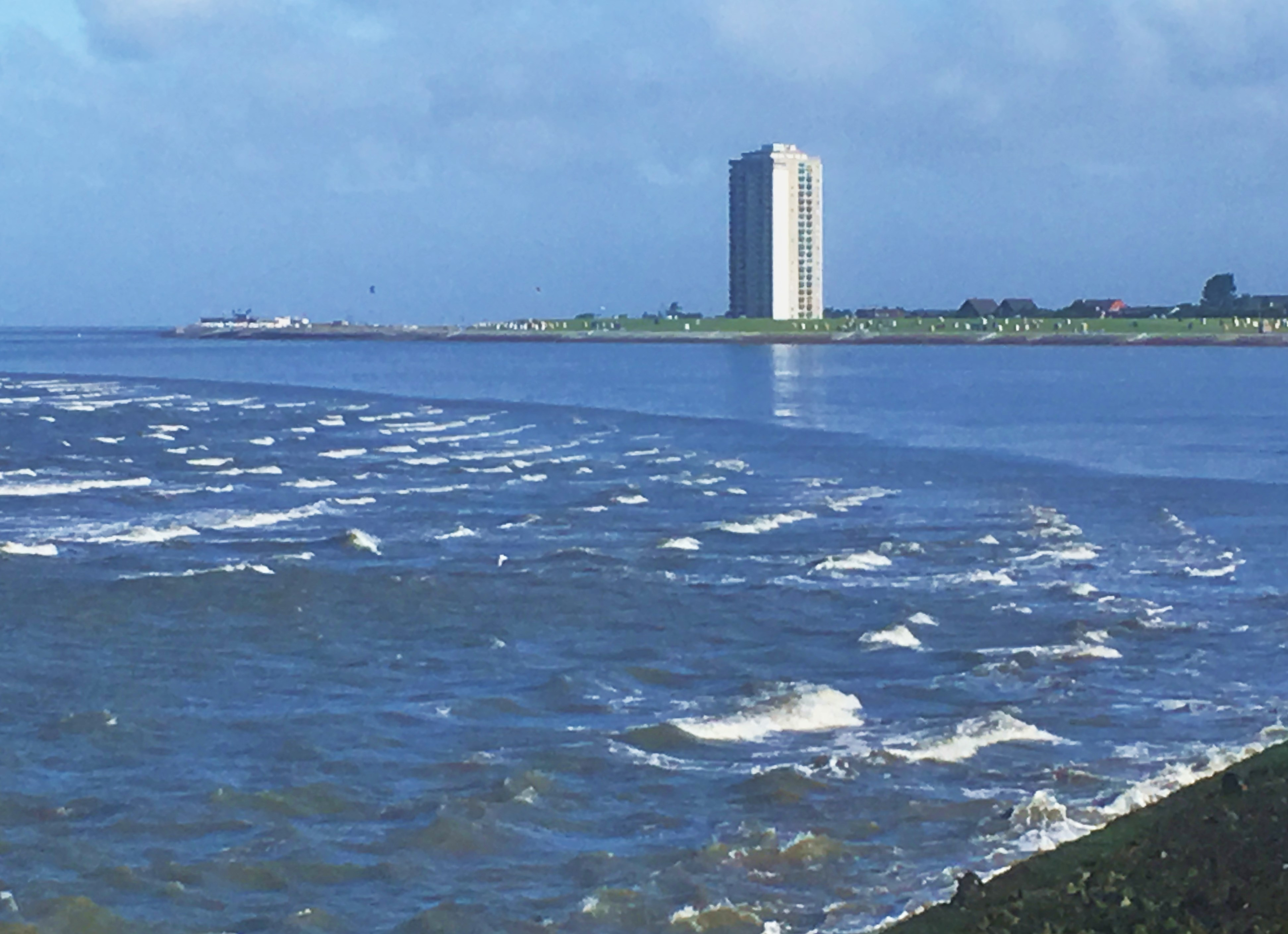 Büsumer Hochhaus am Watt